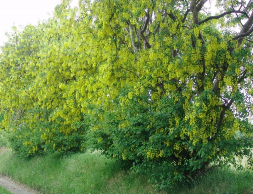 Llwyni tresi aur yn tyfu’n wyllt yn ardal Synod Inn, Cymru yn 2011